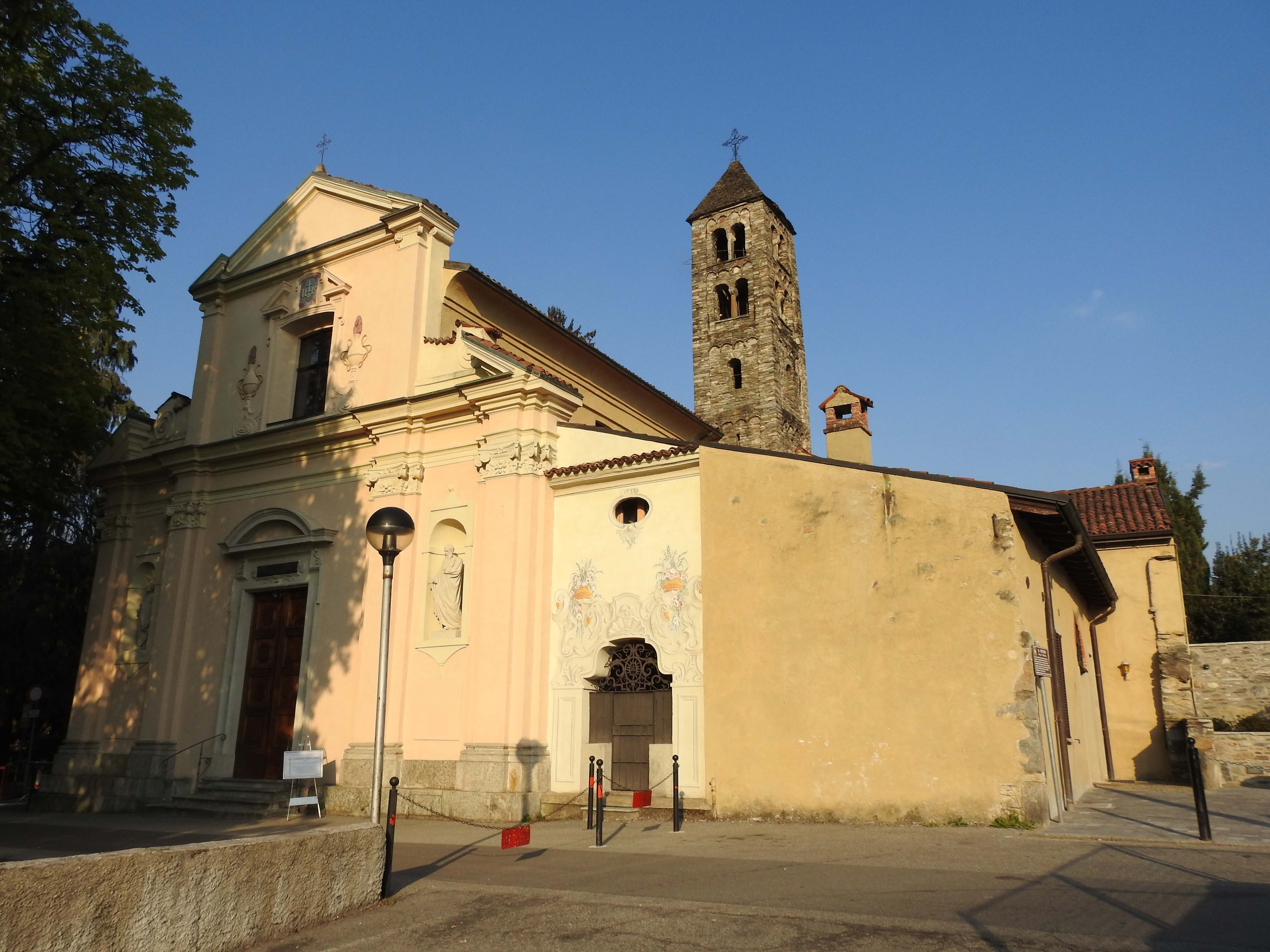 La chiesa di San Pietro in Campagna a Luino.